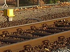 Assenteller te Raalte, eigen foto